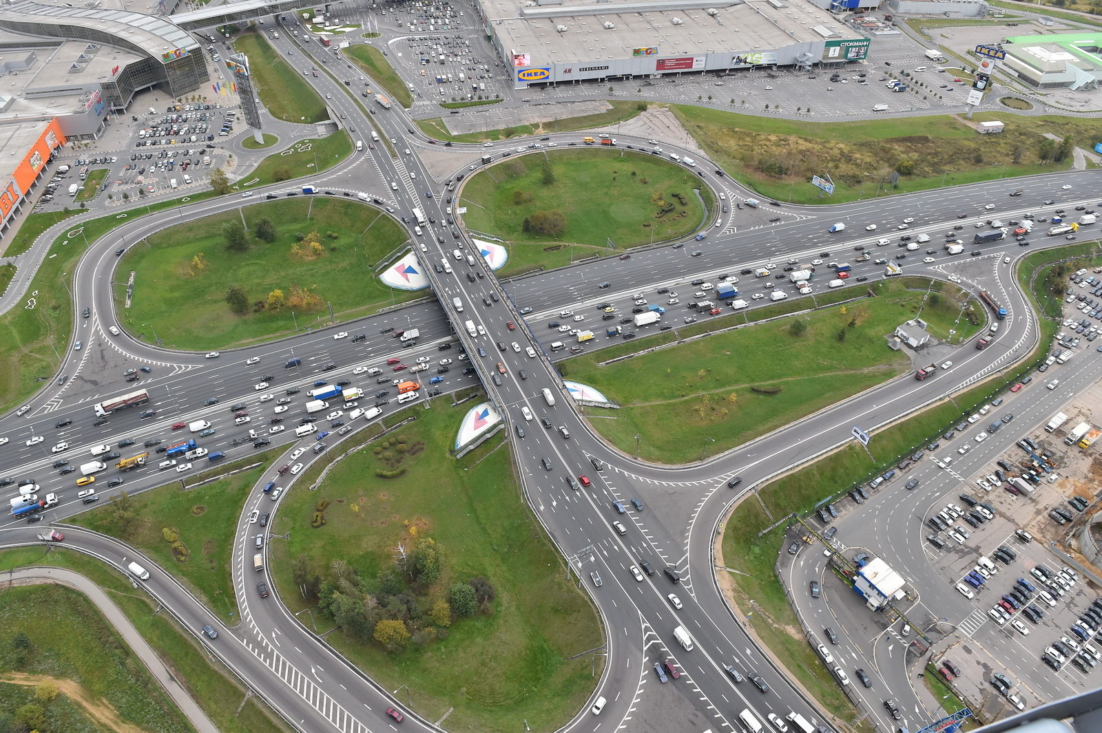 Транспортная развязка на пересечении МКАД с улицей Верхние Поля (Москва) и Новоегорьевским шоссе (Котельники, Московская область). В верхней части фотографии за развязкой располагается территория торгового центра "Мега Белая Дача". Справа внизу фотографии — территория торгового комплекса "Садовод".